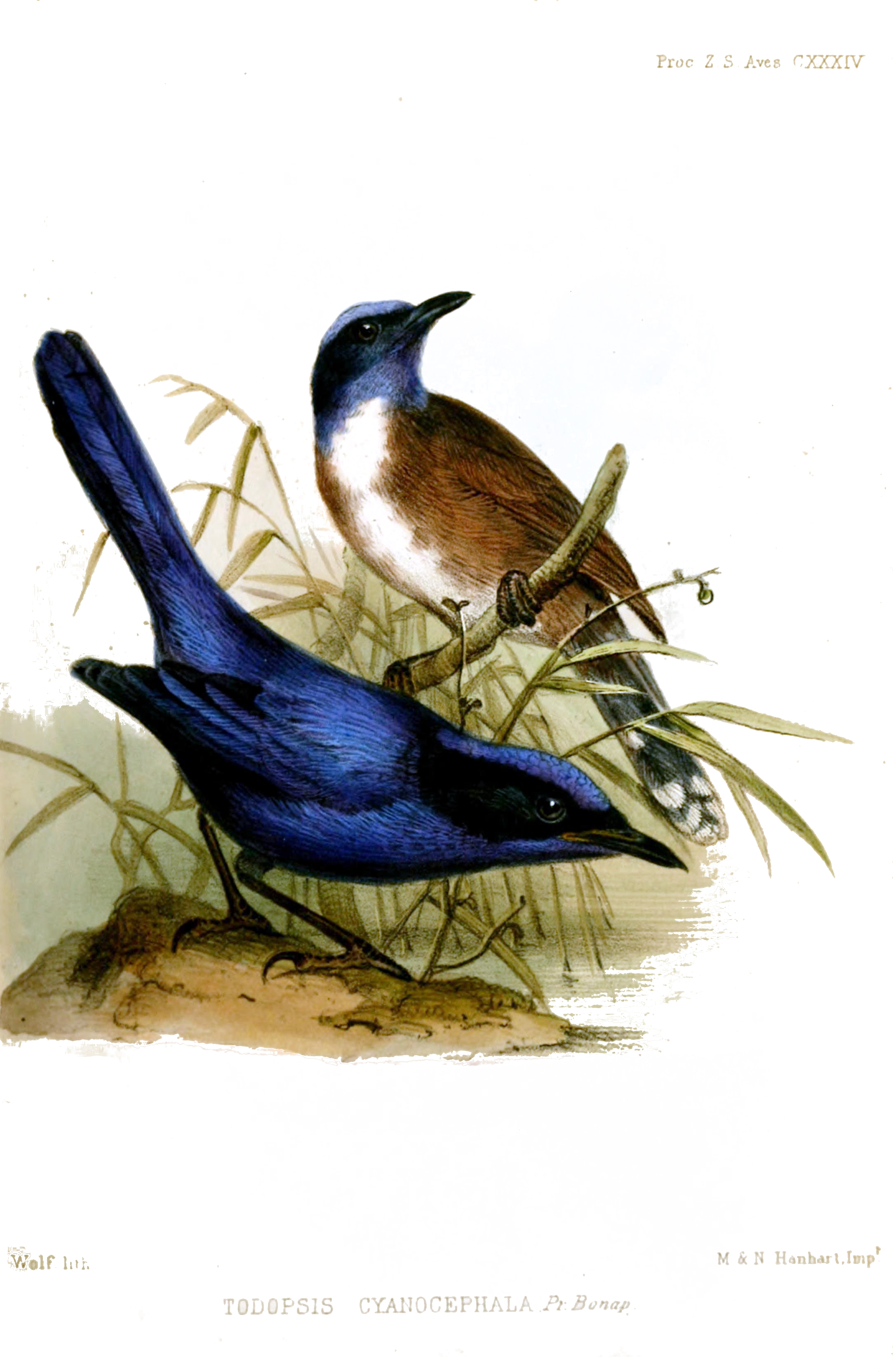 Todopsis cyanocephala = Malurus cyanocephala